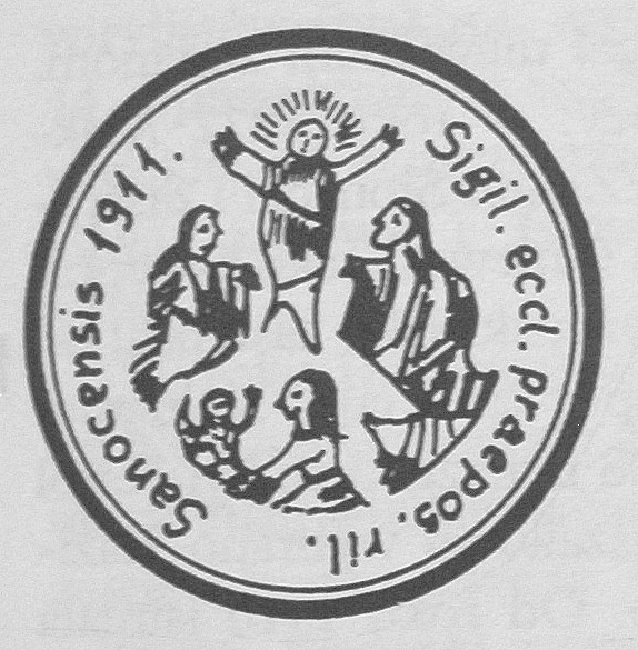 Pieczęć parafii rzymskokatolickiej pw. Przemienia Pańskiego w Sanoku (1911).